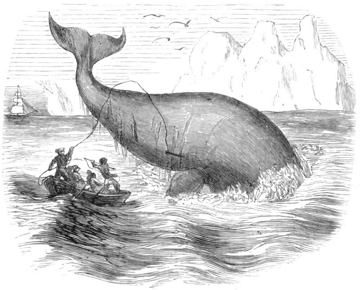 Baleine franche. Illustration de "Histoires des météores", p. 230